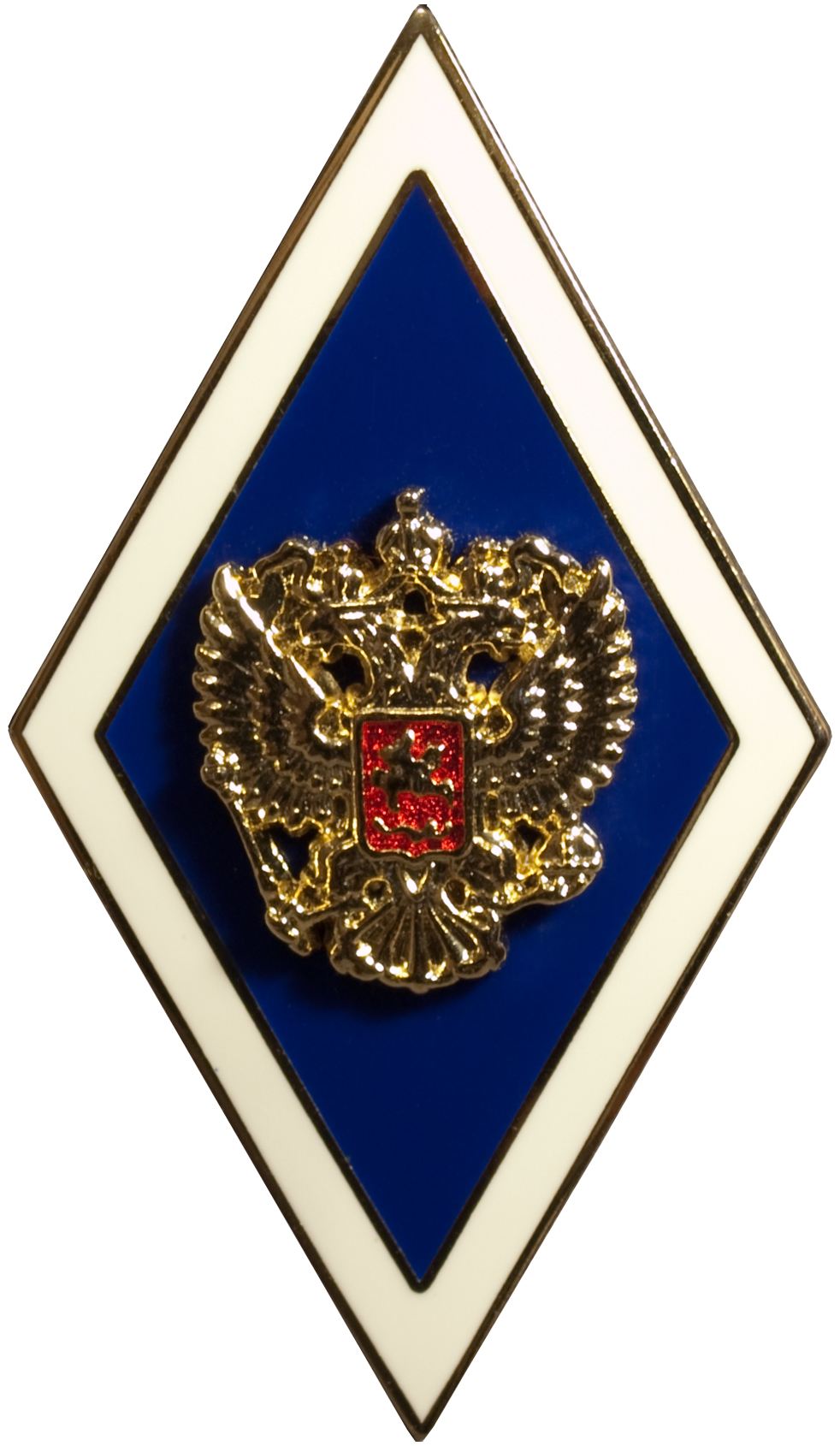 Нагрудный академический знак Воронежского государственного университета. Образец знака утверждён в 2008 году. Изготавливается на Санкт-Петербургском монетном дворе. Высота знака — 45 мм, ширина — 26 мм. Данный нагрудный знак выдан в 2010 году.